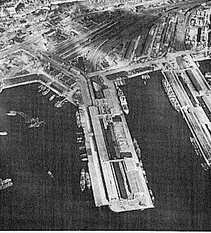 Pusan Harbor, 1950